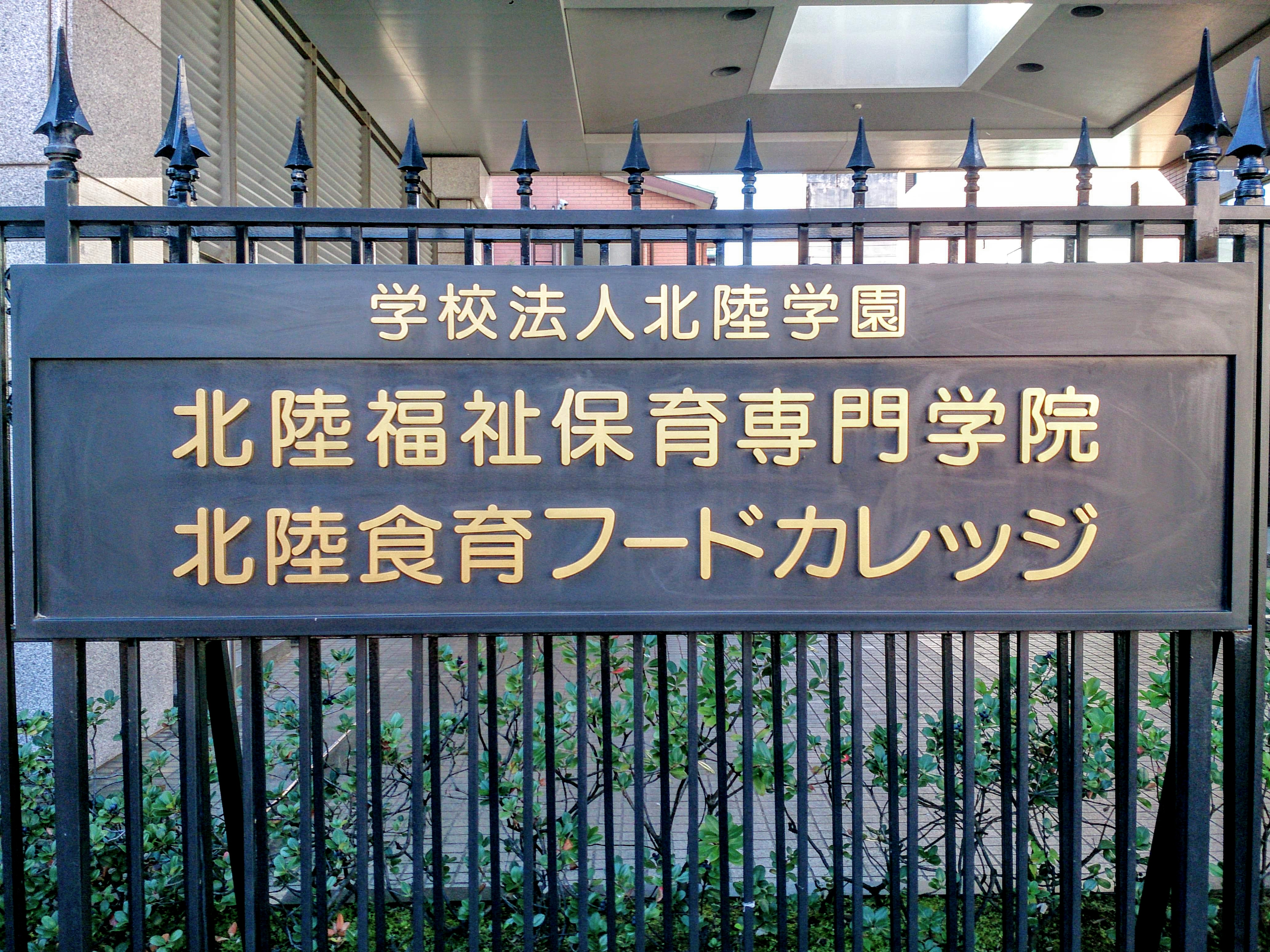 北陸学園の有する二校の学校表示